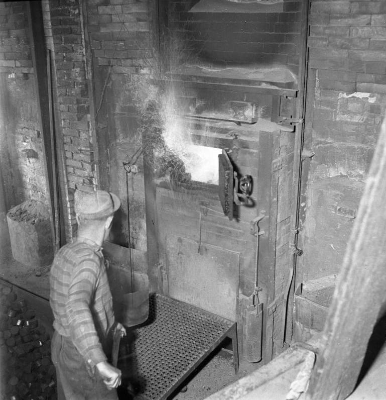 Neu-Gablonz bei Kaufbeuren/Schwaben. Am Schmelzofen einer Glashütte.